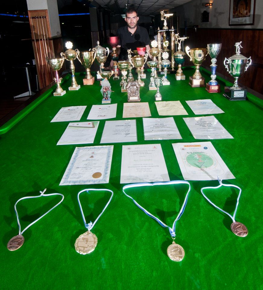 חלק קטן מאוסף הגביעים שזכה